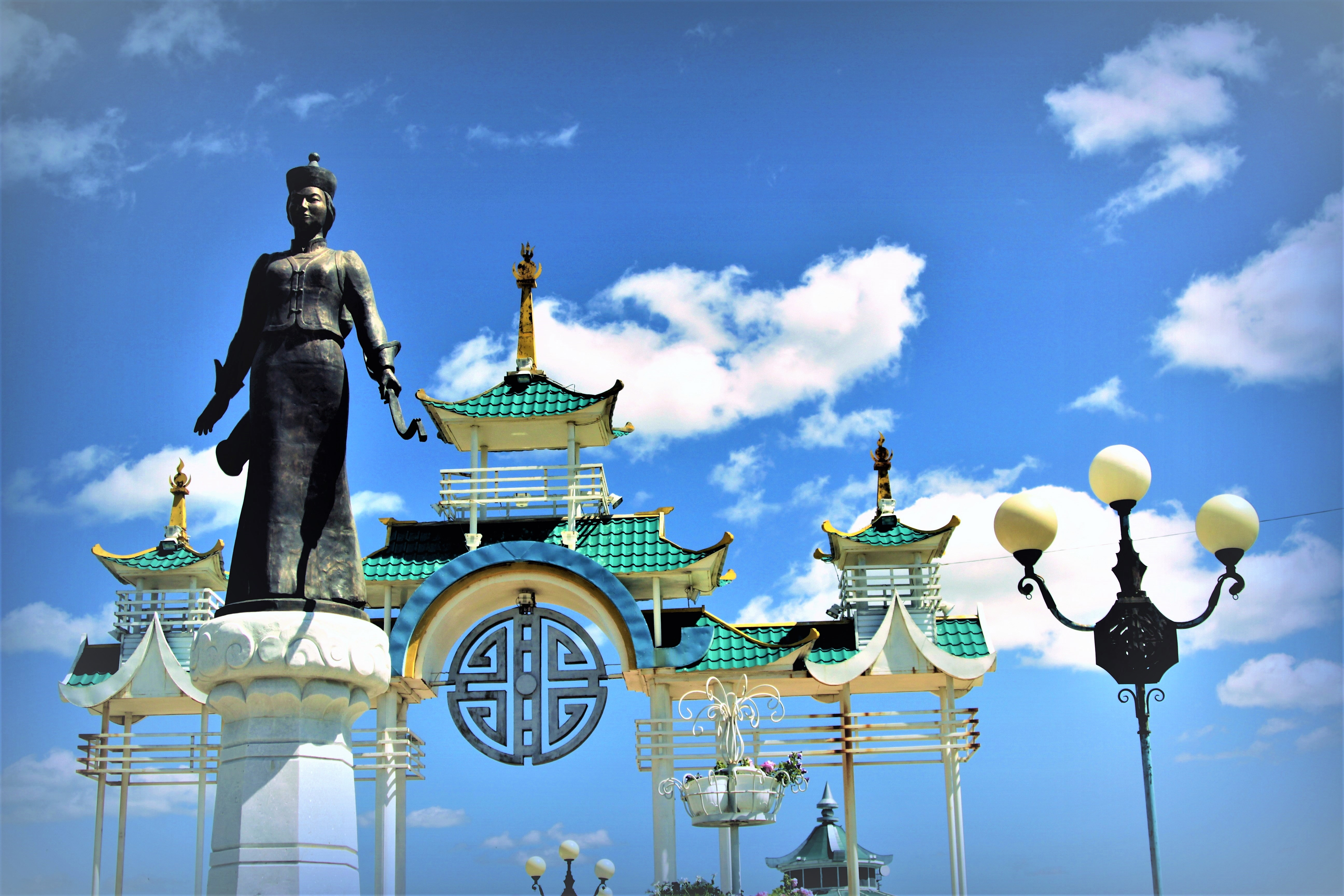 Скульптура "Бальжин-хатан" установлена на въезде в поселок Агинское Забайкальского края